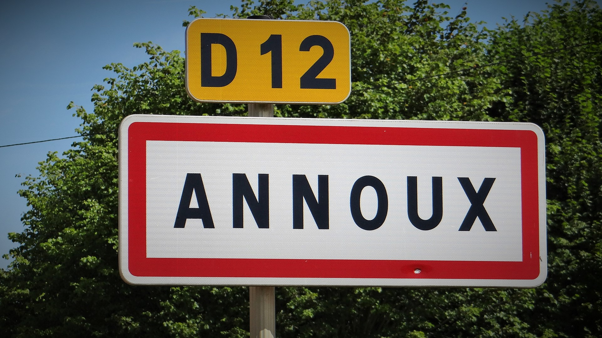 panneau Annoux route de Sarry